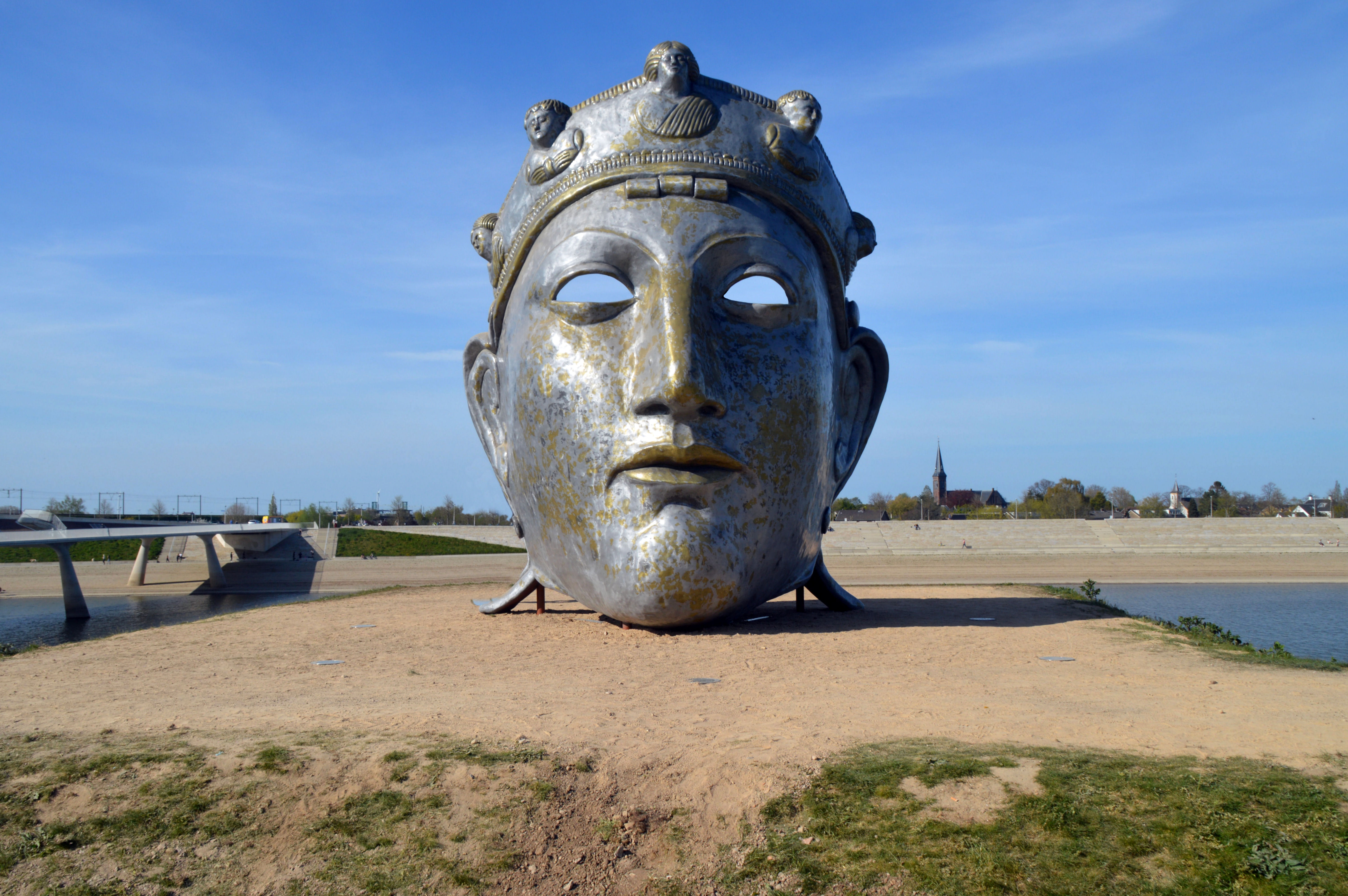 Romeins Masker Ruitermasker Gezichtshelm Romeinse Andreas Hetfeld 2020 Nijmegen